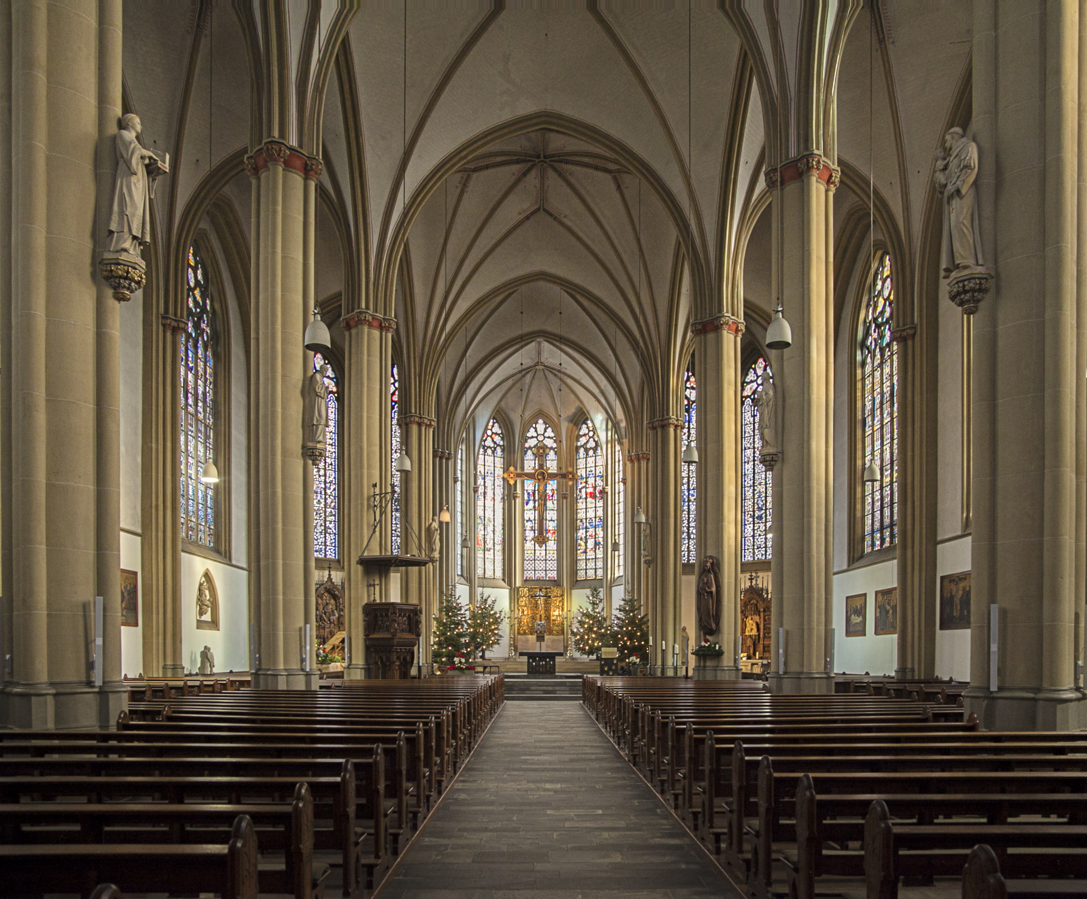 Borghorst St. Nikomedes, Blick durch das Hauptschiff zur Chorapsis